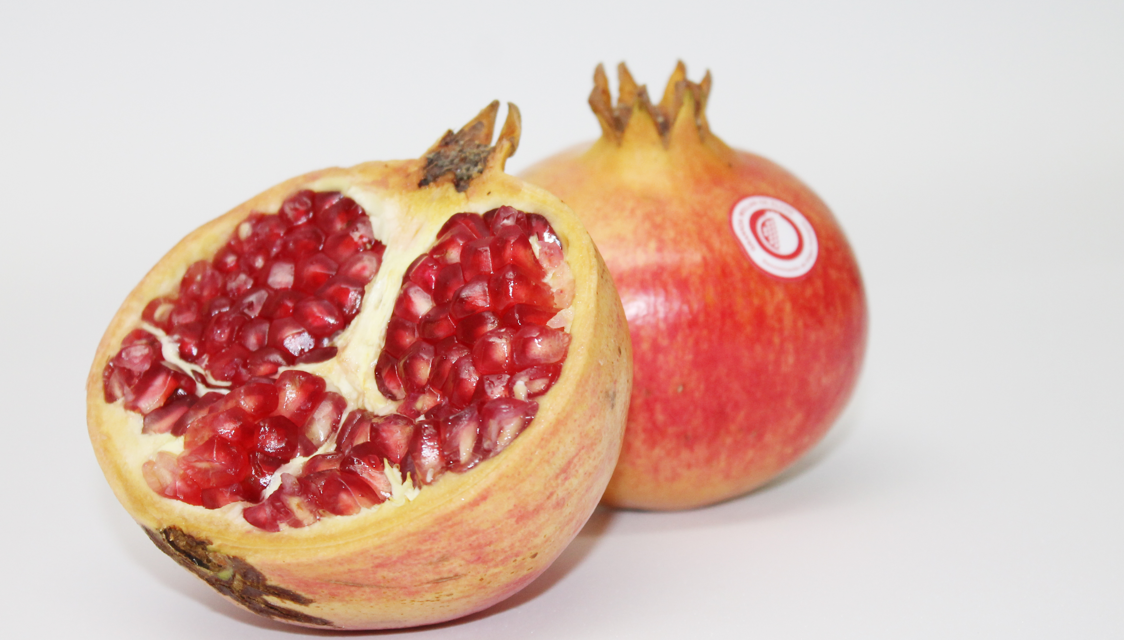 Granada Mollar de Elche